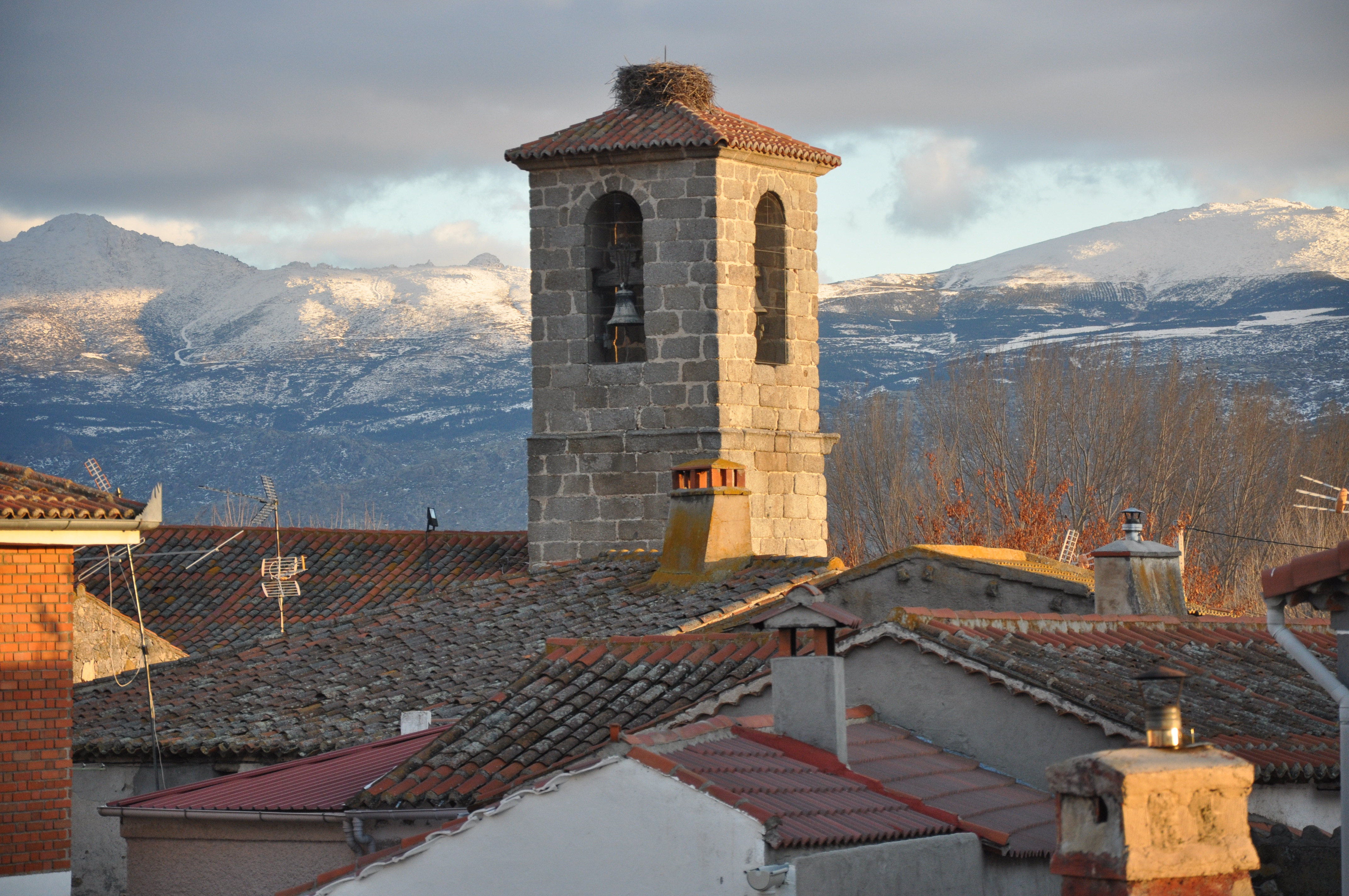 Campanario de La Torre (Ávila), con la Sierra de la Paramera al fondo. España.